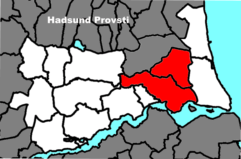 Pastorats beliggenhed i Hadsund Provsti.